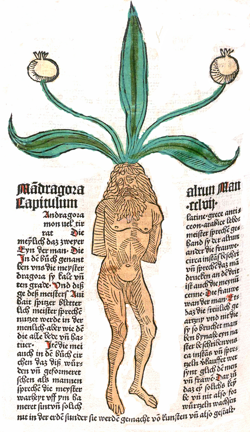 Mandragora Mann